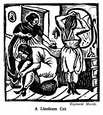 «A Linoleum Cut», en el número de septiembre de 1921 de The Liberator.